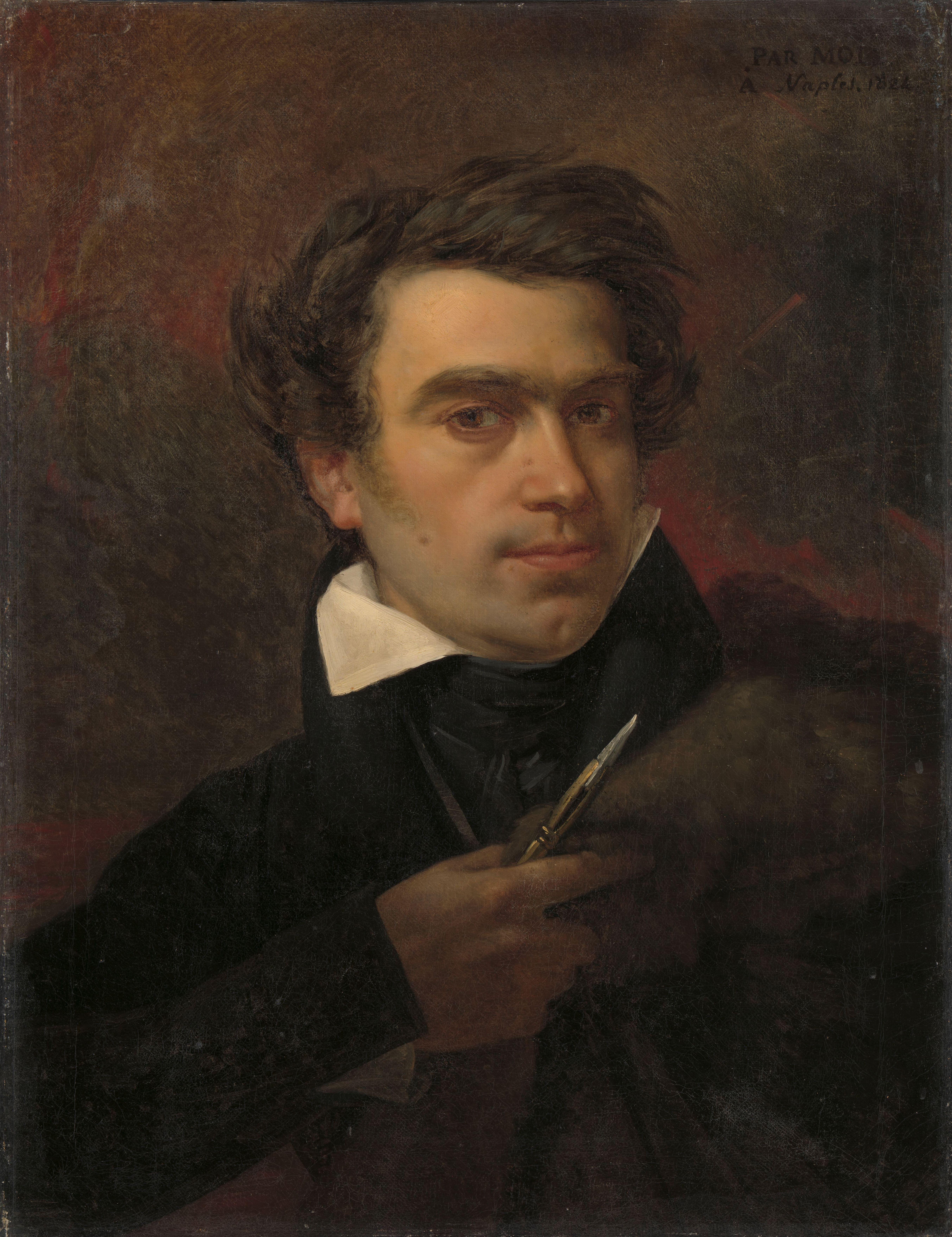 Zelfportret van de schilder Pierre Van Hanselaere. Buste, met een penseel in de rechterhand.